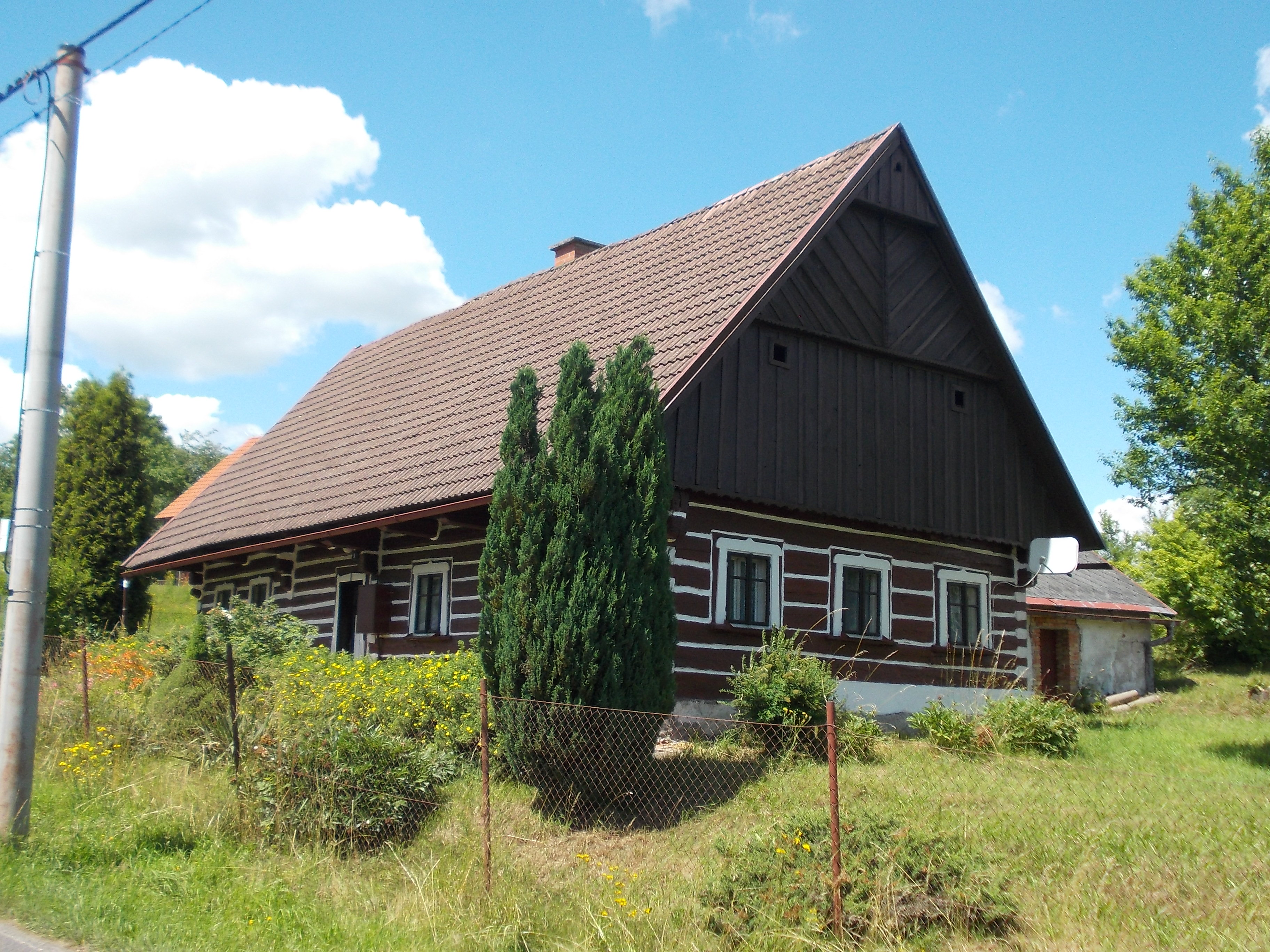 Bukovina u Čisté - dům č.p. 9